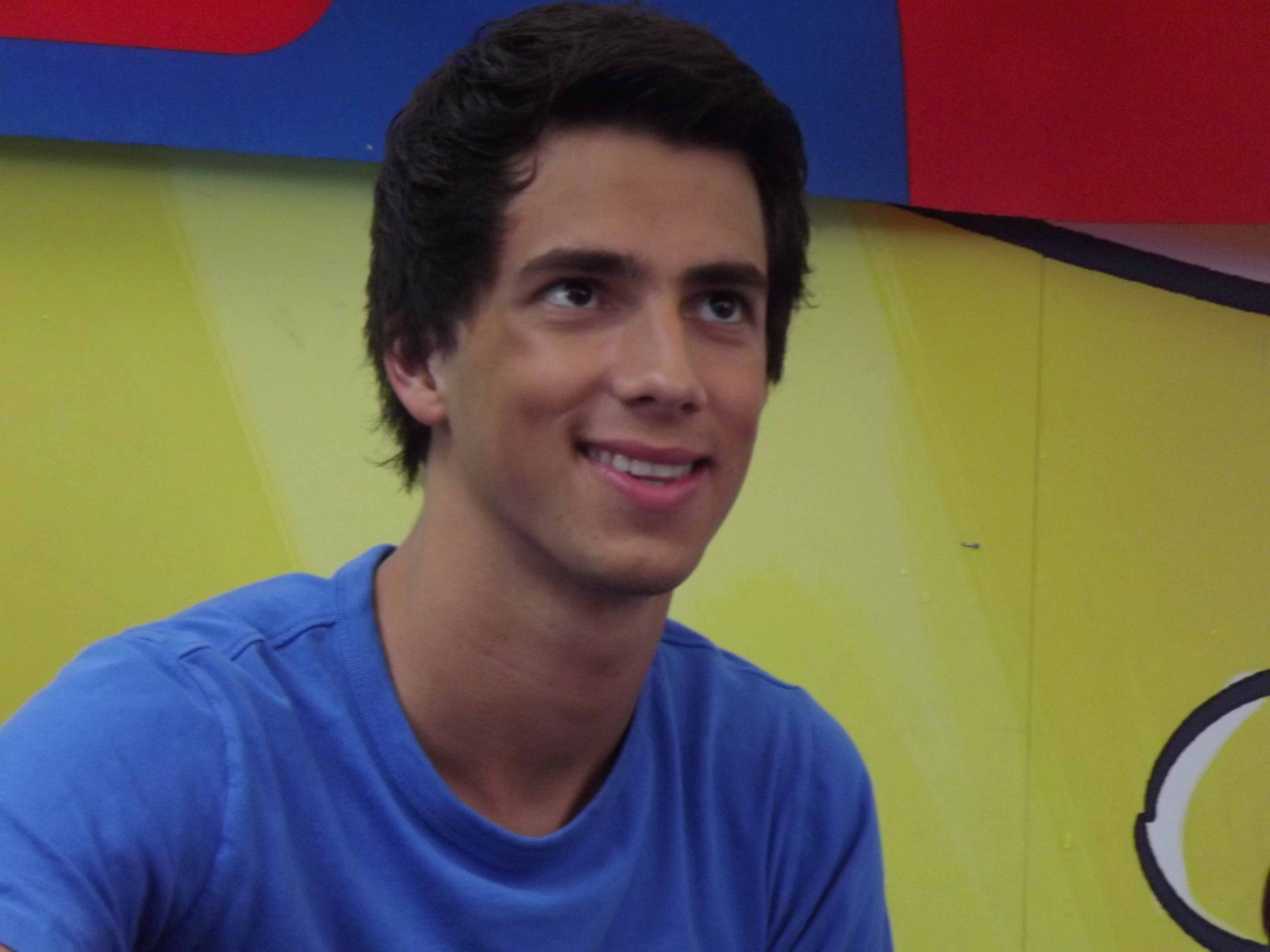 Nicolas Caeyers alias Stef / Exo-7 uit "Galaxy Park" tijdens de Ketnet-fandagen in Plopsaland De Panne op 8 juli 2012